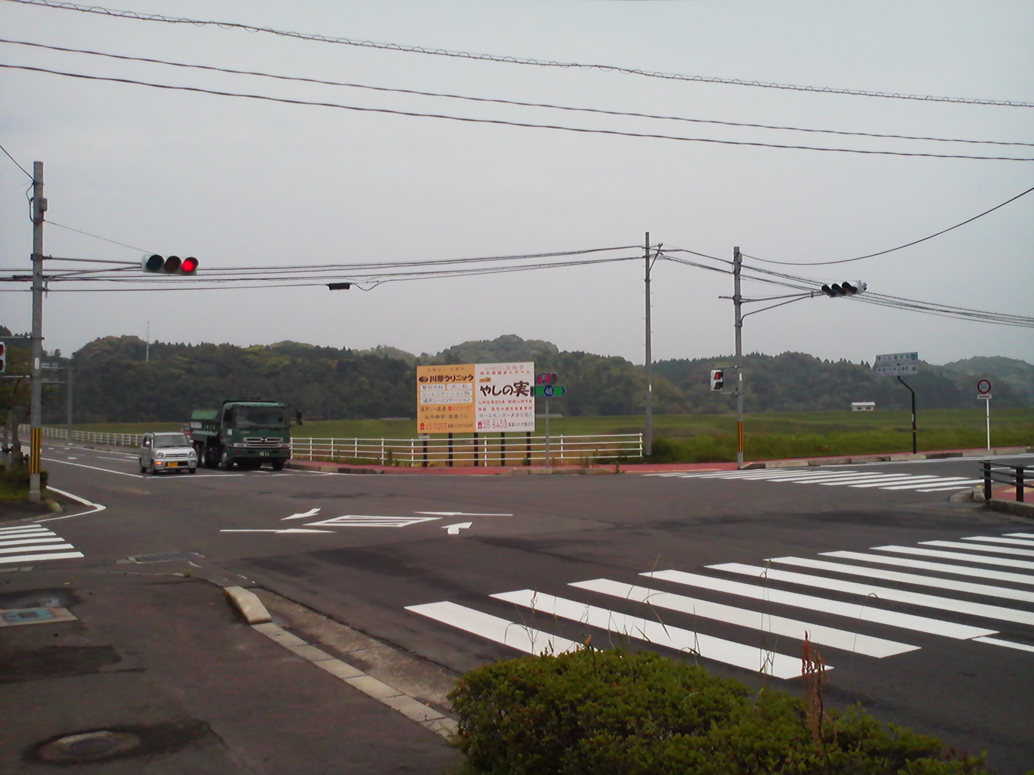 薩摩川内市東郷町斧渕にある、国道267号とja:鹿児島県道46号阿久根東郷線の交差点。